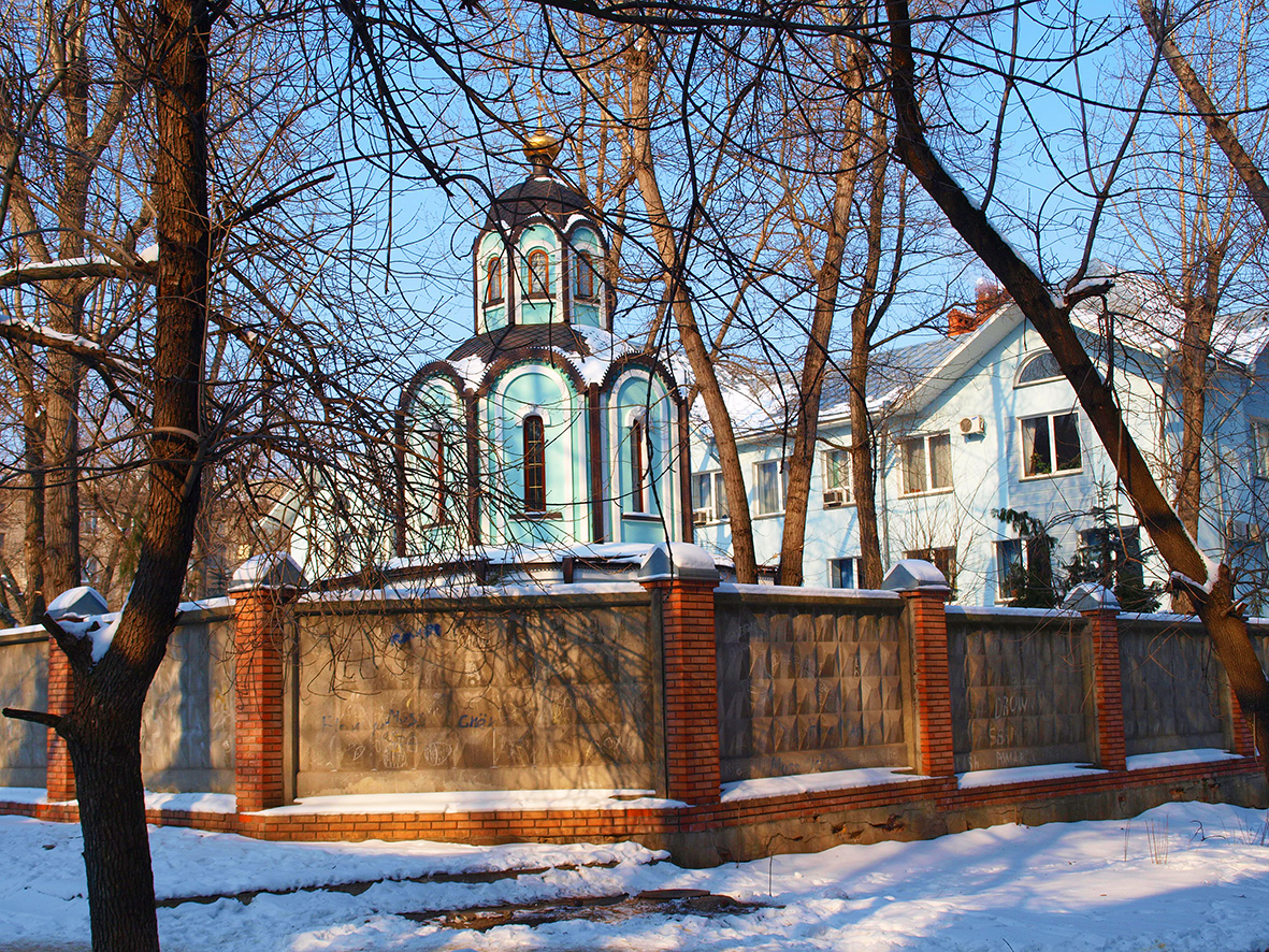 Каплиця на вул. 3-тій Донецькій (Луганськ)